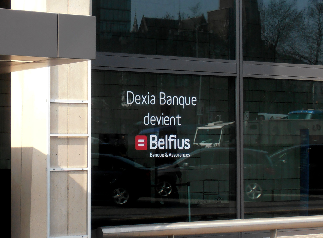 "Dexia bank wordt Delfius" op kantoor van (ex-)Dexia